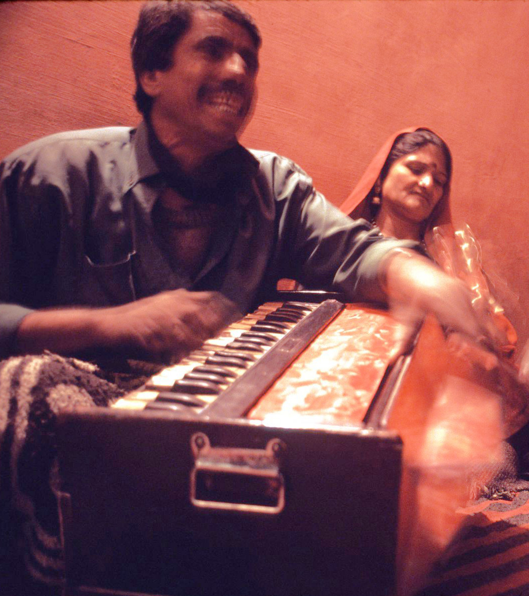 Hombre tocando un Armonio en Pakistán Man playing a harmonium in Bikaner, Rajasthan, India. Photo by Joe Morris